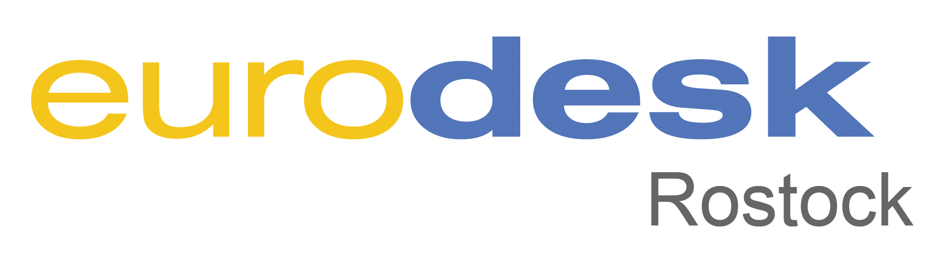 Eurodesk Rostock Logo